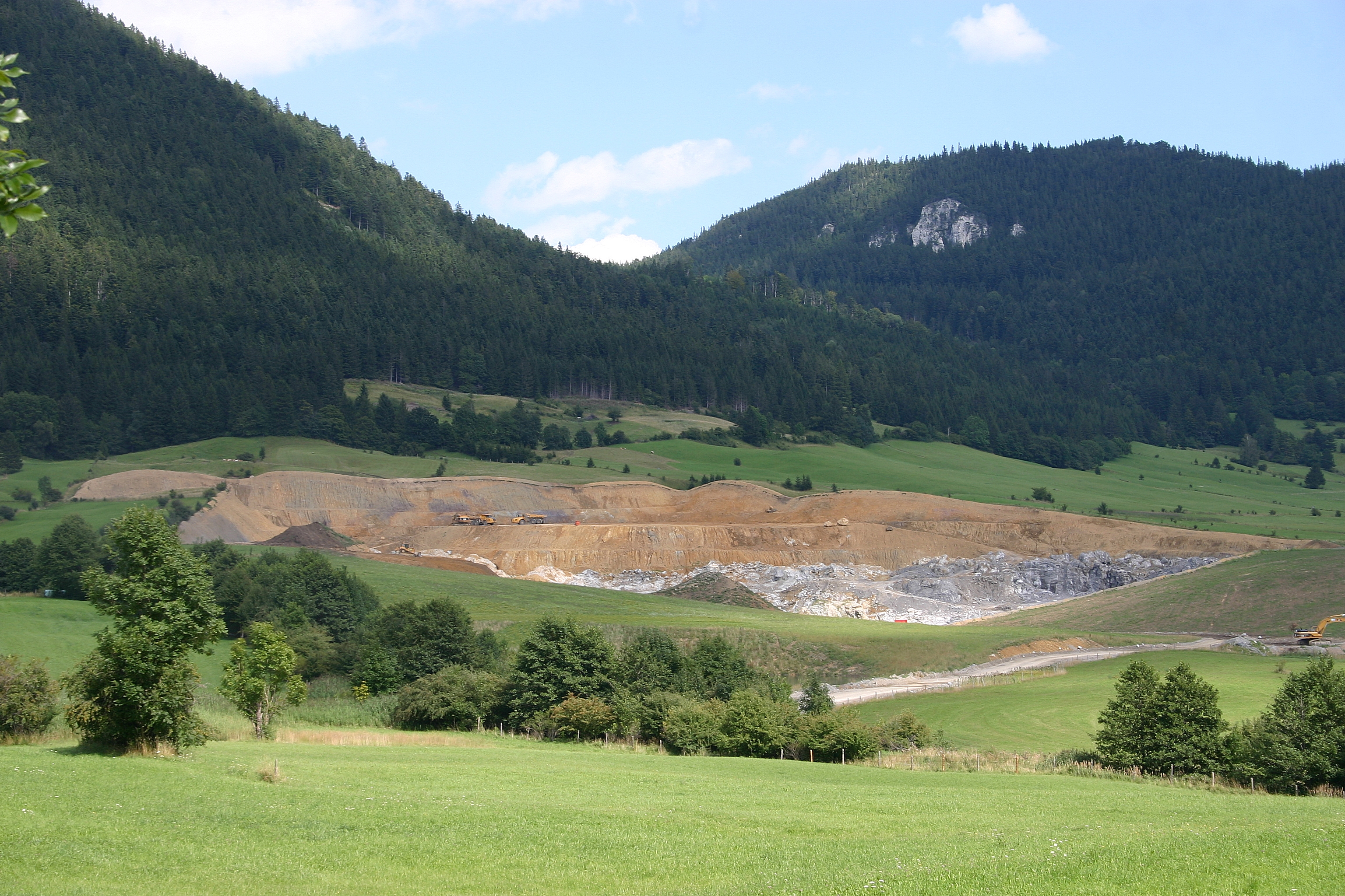 Puchberg am Schneeberg Gipsabbau